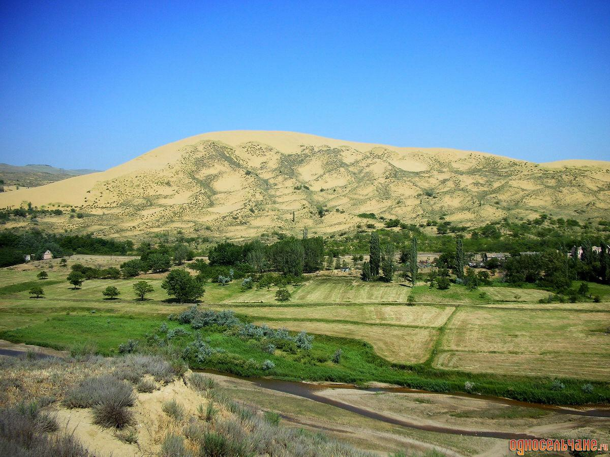 Бархан 'Сары-Кум', Кумторкалинский район This image is related to the protected area of Russia number 0510023